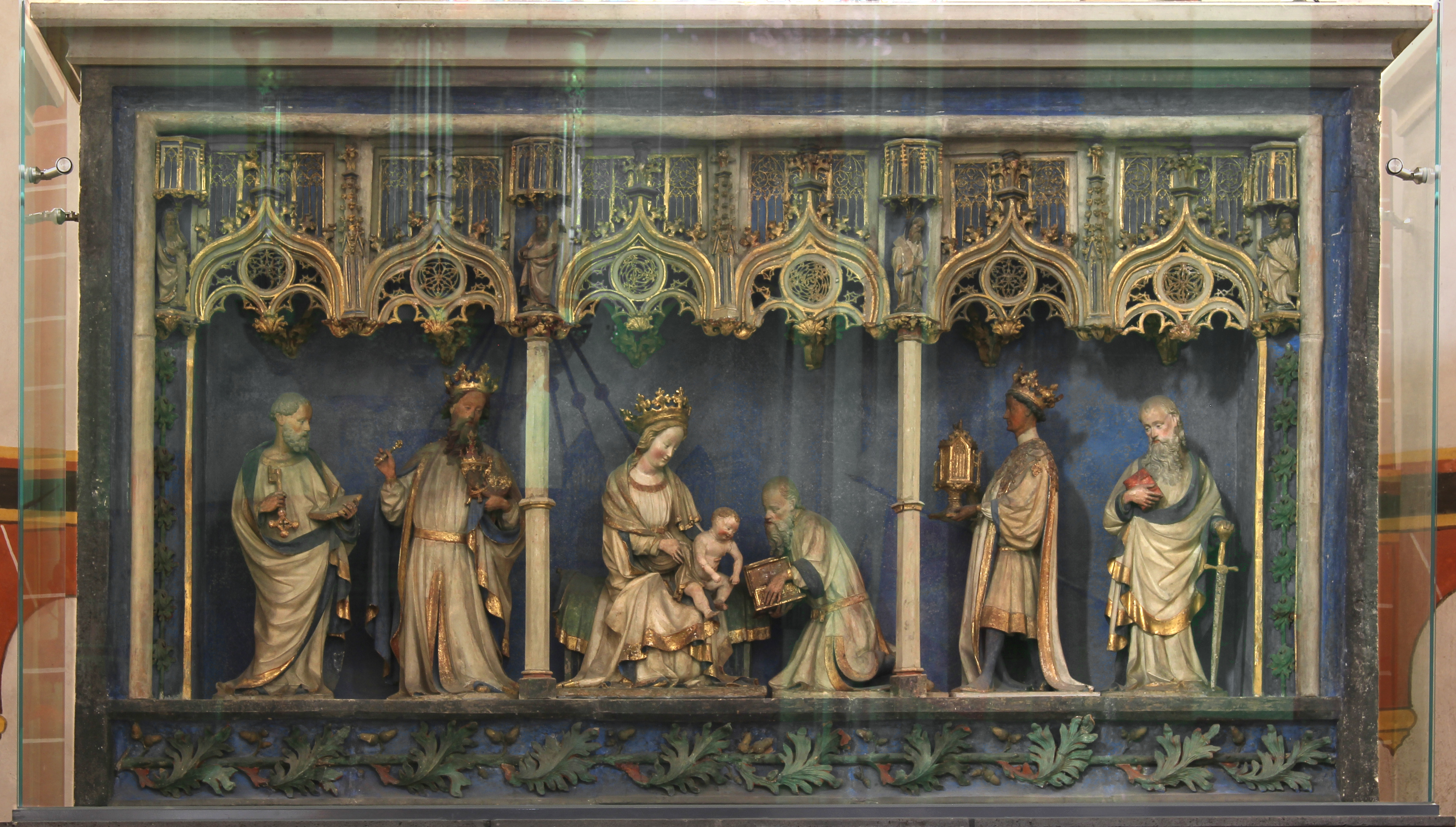 Altarretabel in der ehemaligen Stiftskirche St. Castor in Karden, um 1420, Figuren aus Ton gebrannt (hinter Glas). Statuen: Thronende Muttergottes mit Kind, Heilige Drei Könige, links und rechts die Apostel Petrus und Paulus, auf den Konsolen unter den kleinen Baldachinen vier Propheten mit Schriftrollen